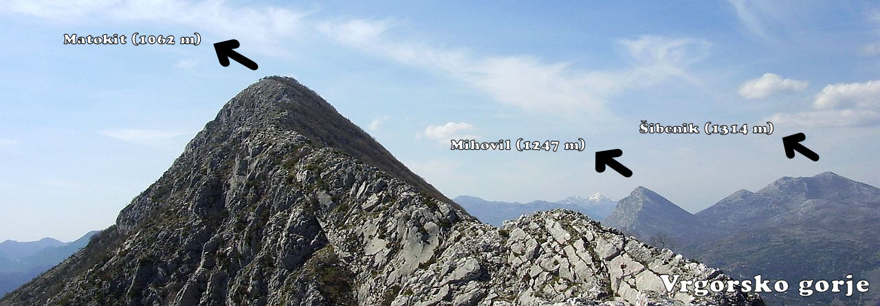 Pogled na sva tri istaknuta gorska hrbata u masivu Vrgorskog gorja